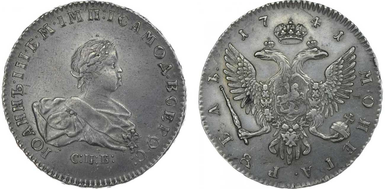 Іоан Антонович. Рубль 1741 року.